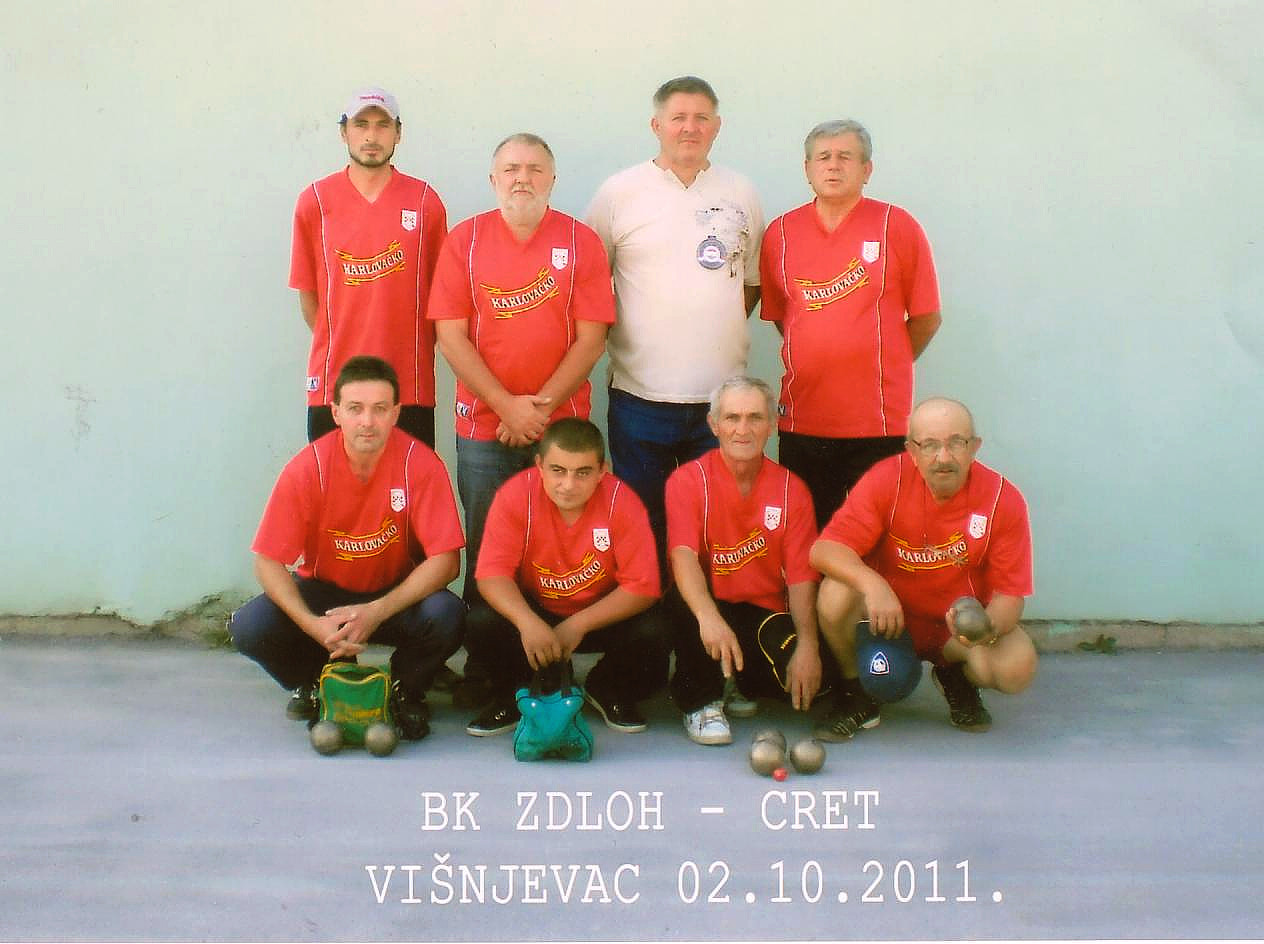 ZDLOH, boćarski klub iz Creta Bizovačkog